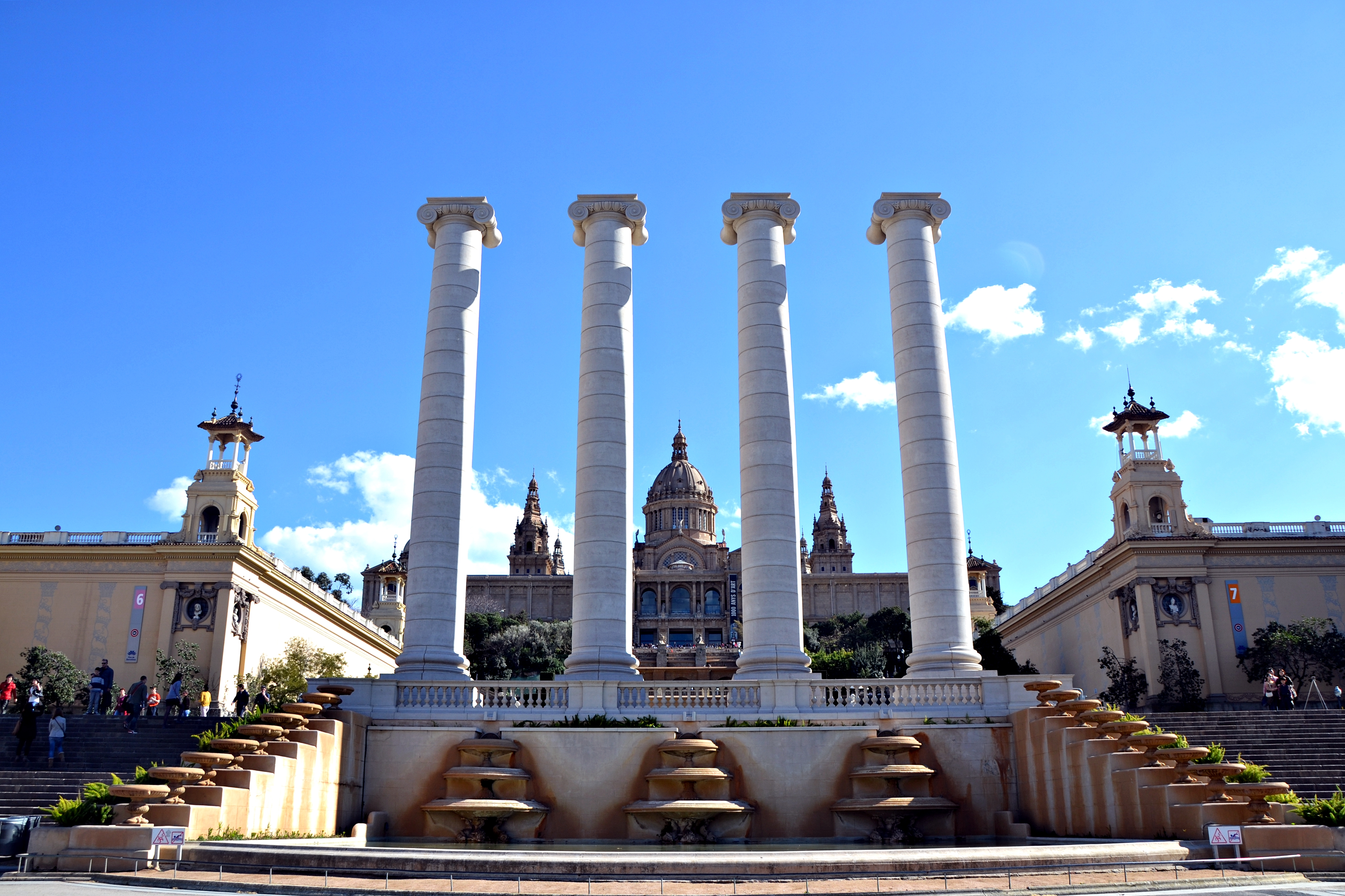 Les quatre columnes (Josep Puig i Cadafalch). Pl. Carles Buigas (Barcelona)